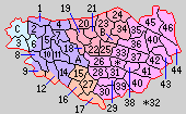 北埼玉郡の町村。